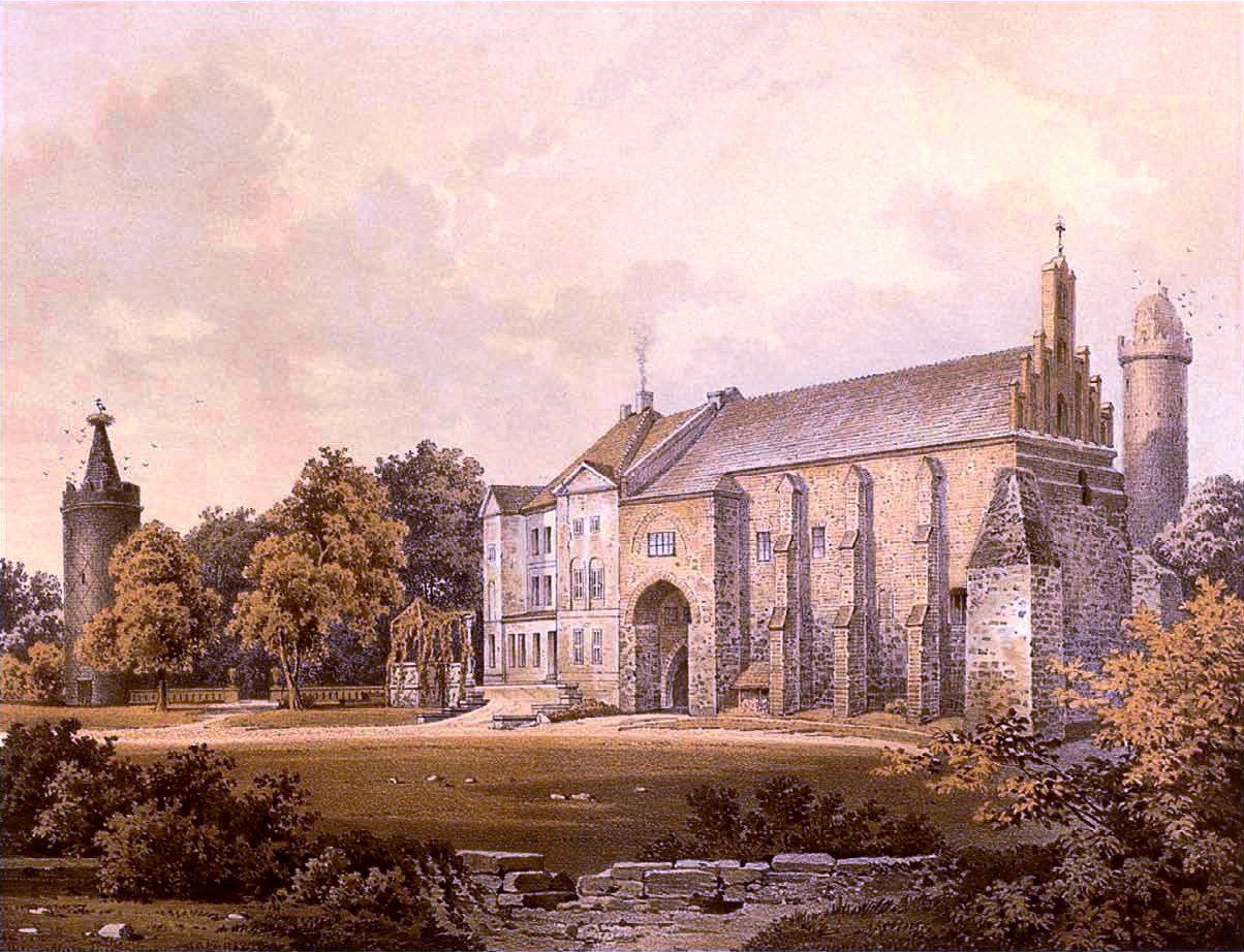 Burg Ziesar, Kreis Jerichow I, Provinz Sachsen, Lithographie von Alexander Duncker